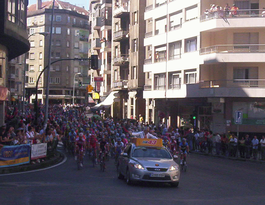 Vuelta a España 2007 Vigo